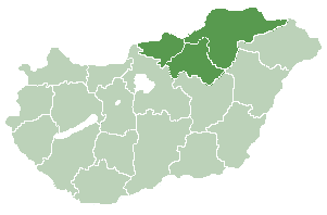 Észak-Magyarország region of Hungary.